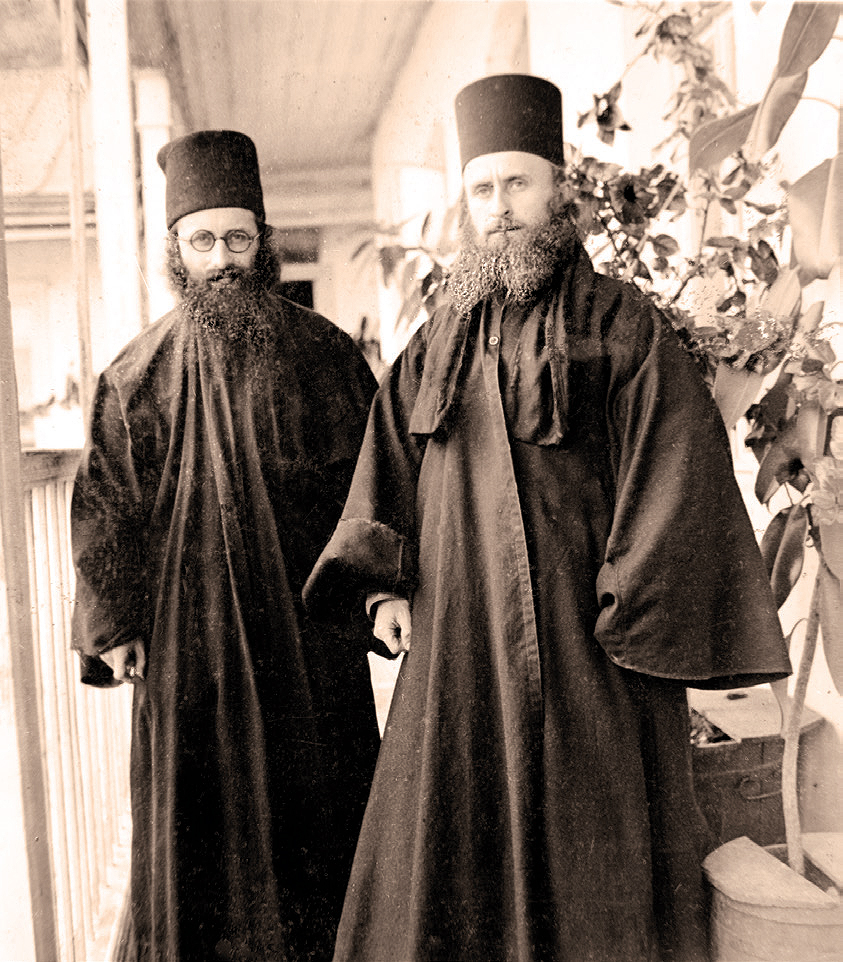 Монах Василий (Кривошеин) и иеродиакон Софроний (Сахаров). Святая Гора Афон, 1933 г.